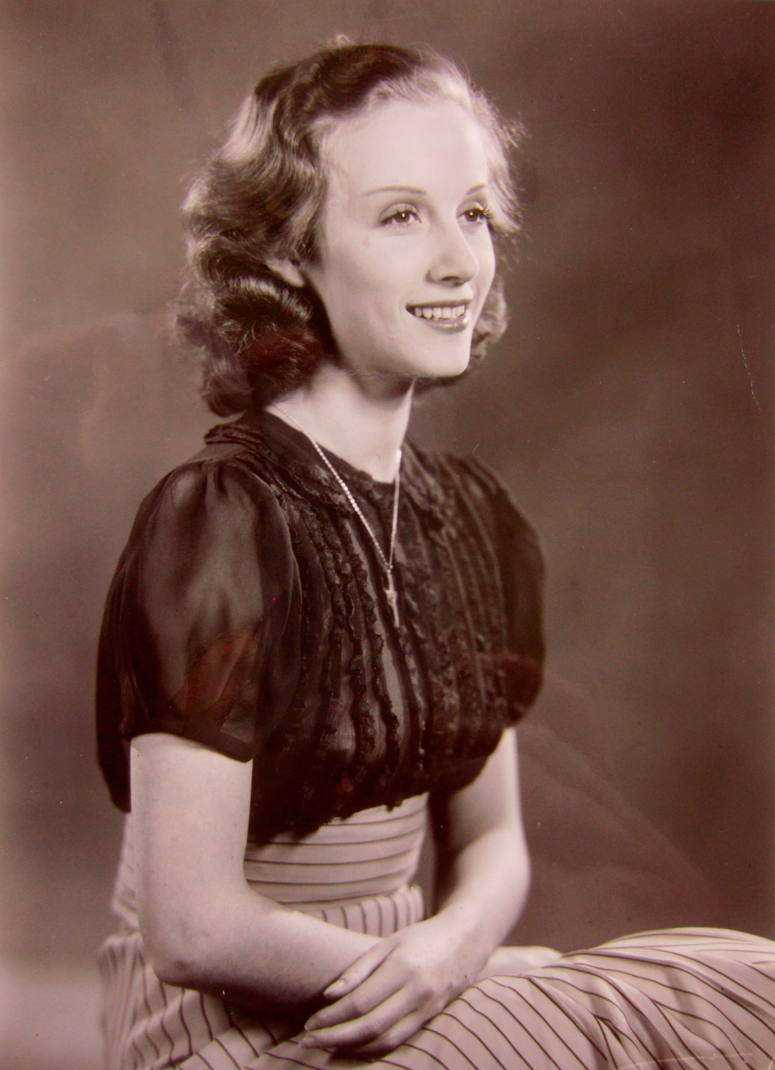 Marianne Aminoff 1916-84, svensk skådespelare